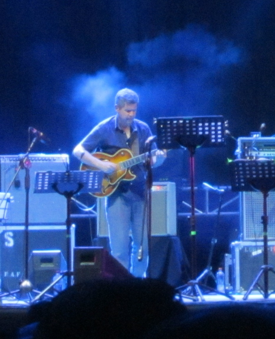 La Marraqueta en el Festival Internacional Providencia Jazz